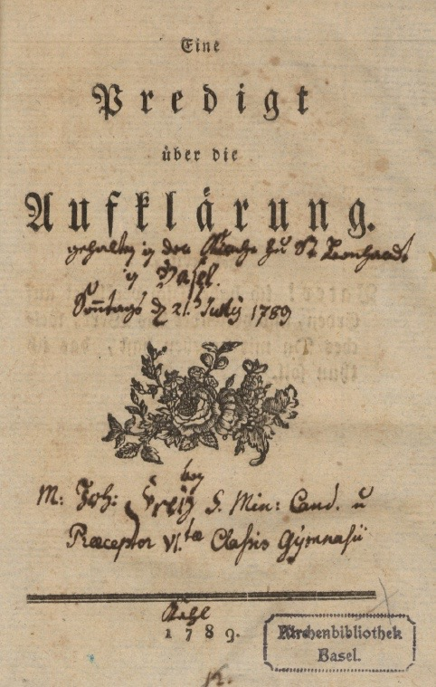 (Johannes Frey:) Eine Predigt über die Aufklärung. (Basel) 1789. (Gehalten zu St. Leonhard, 21. Juli 1789.)